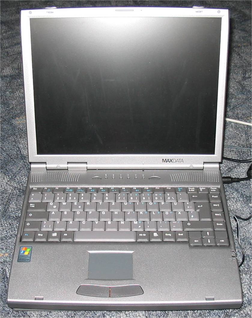 Maxdata Notebook